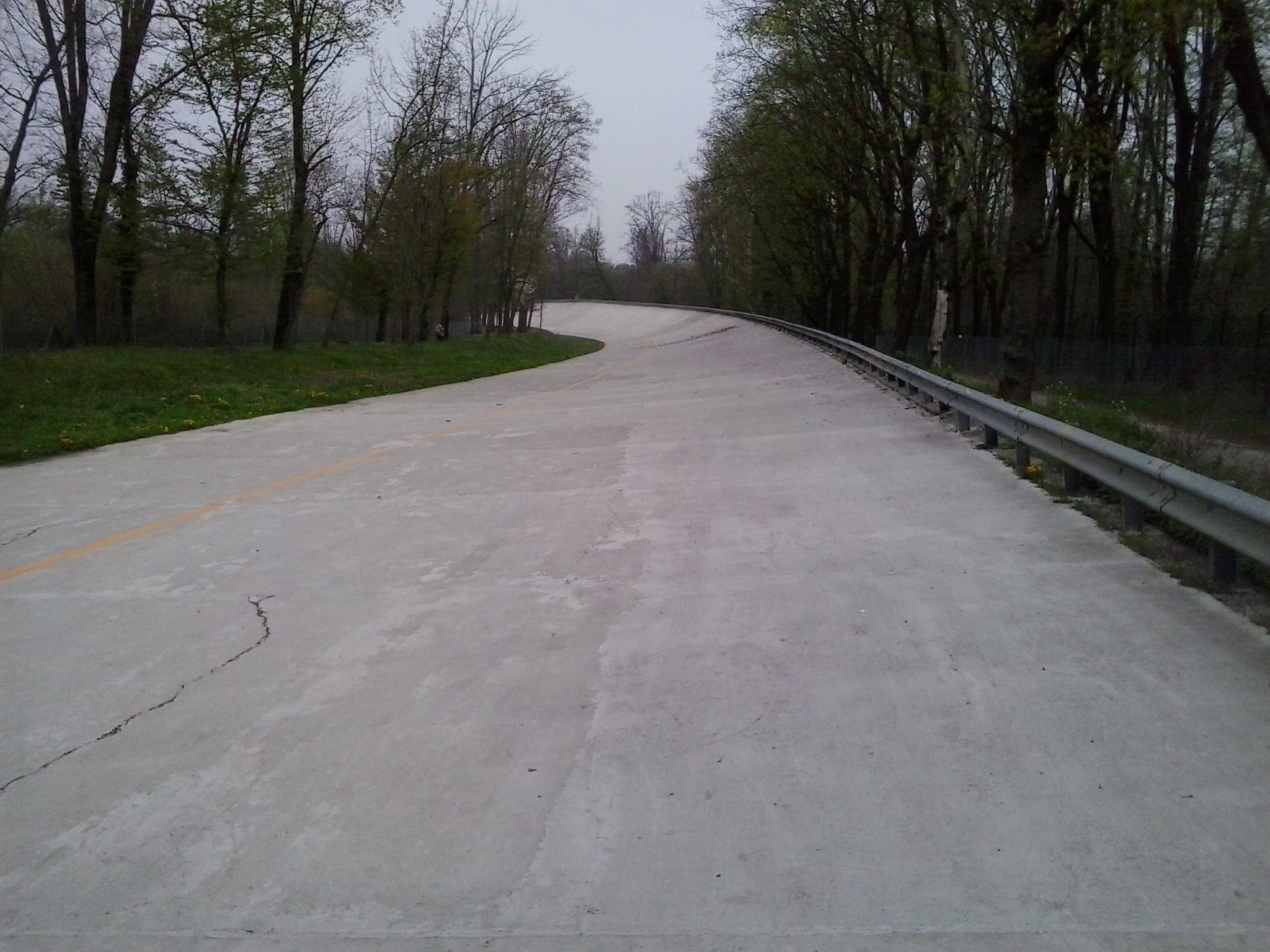 Sopraelevata dell'Autodromo nazionale di Monza